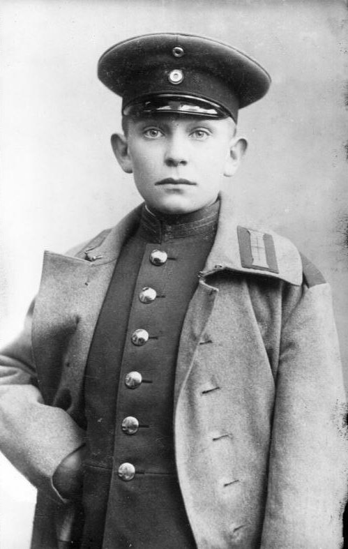 Hermann Göring, 1907 7862-33